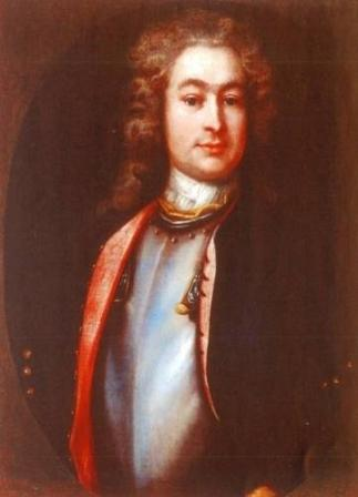 Jakob Johann Stael von Holstein (1699-1755), Estonian nobleman